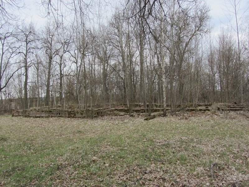 Месца царквы Вылева Добрушскага раёна